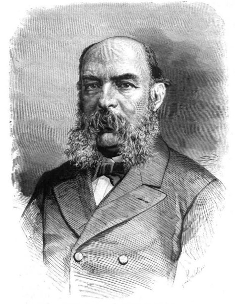 Retrato de José Amador de los Ríos en un retrato la revista La Ilustración Española y Americana de 1878